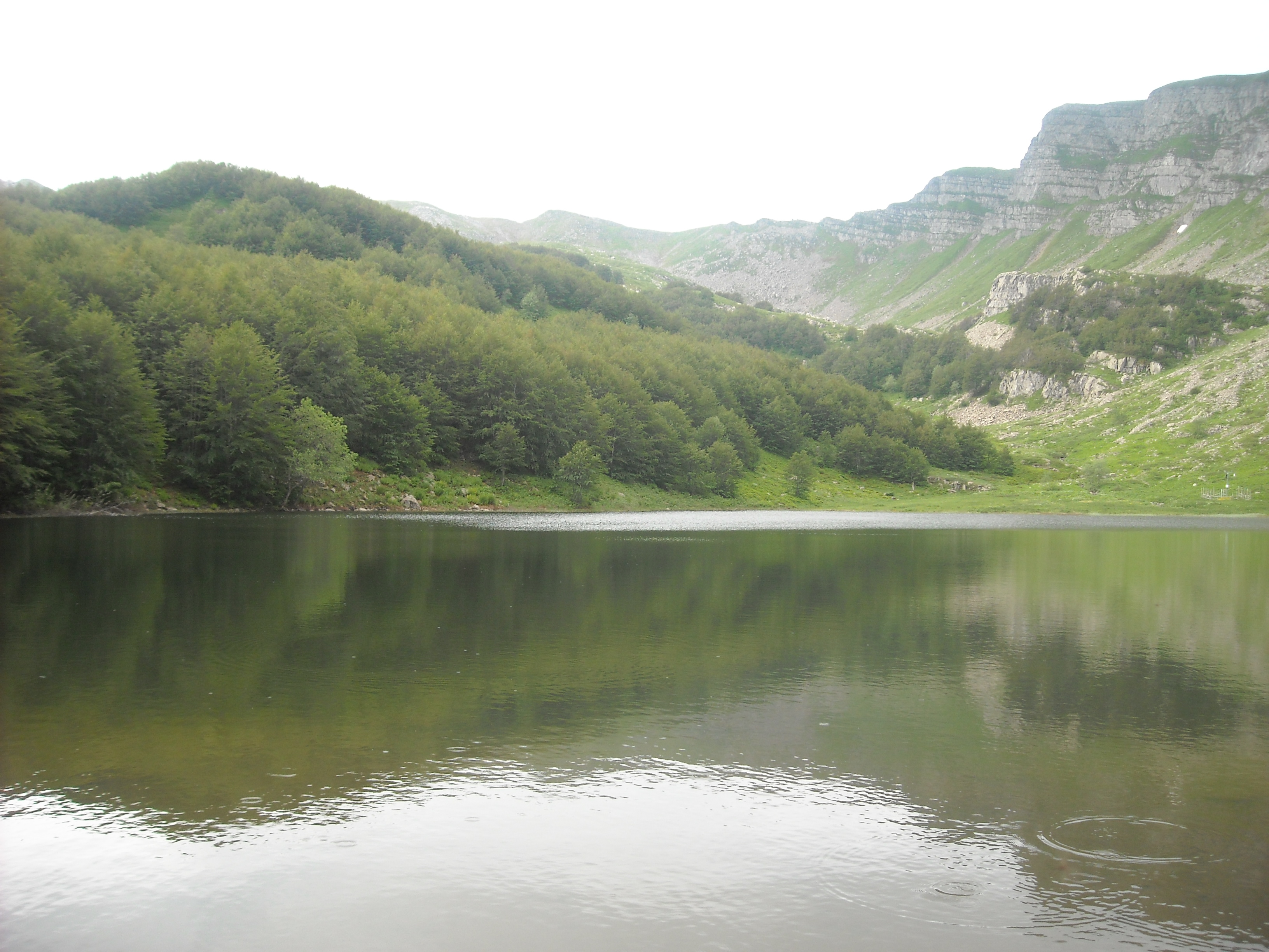 Il lago Baccio da davanti